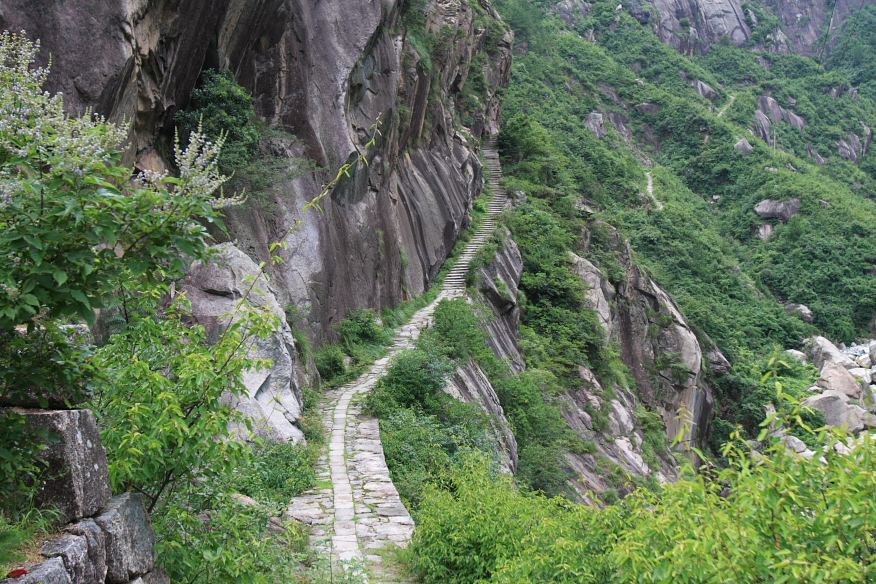 徽杭古道